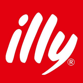 Illy logo